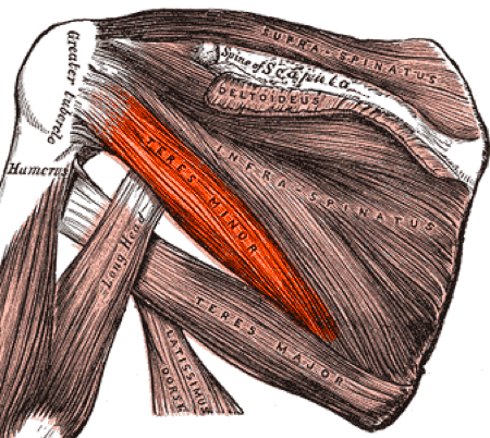 Teres minor, colorized